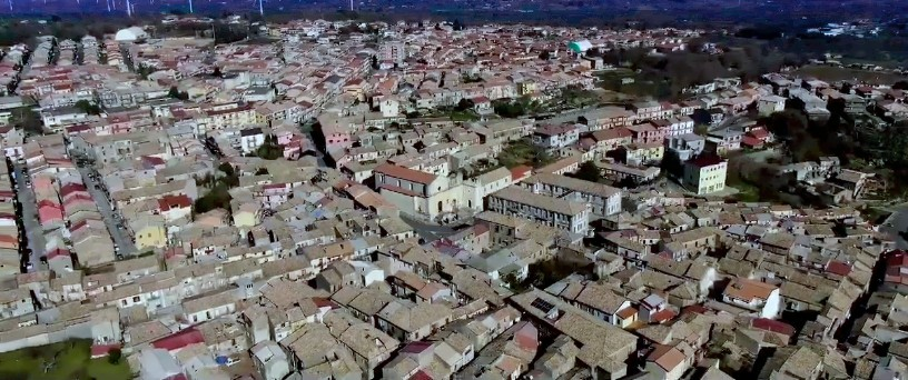 Veduta dall'alto di Girifalco (cz)